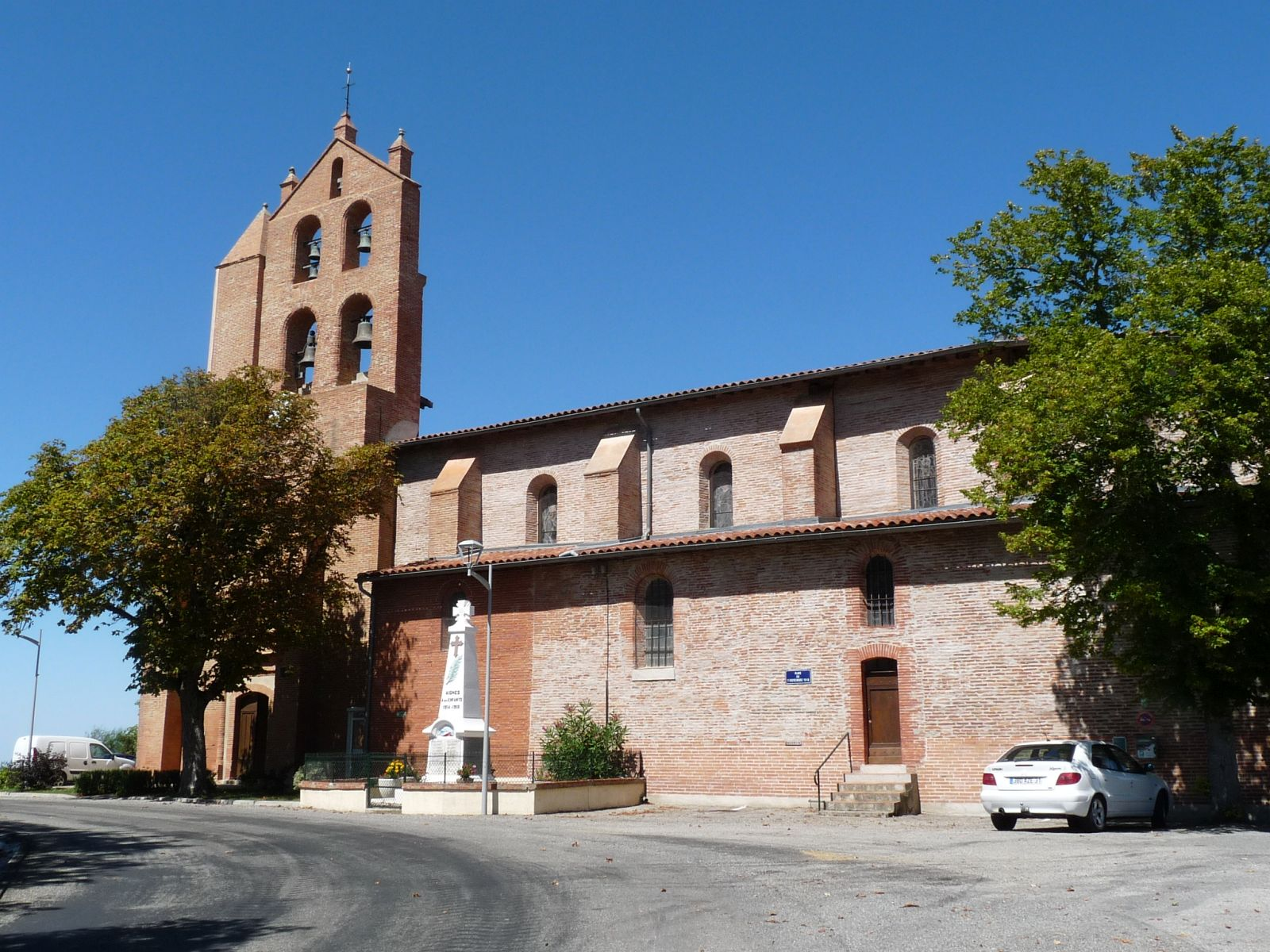 Eglise d'Aignes, Haute-Garonne, France